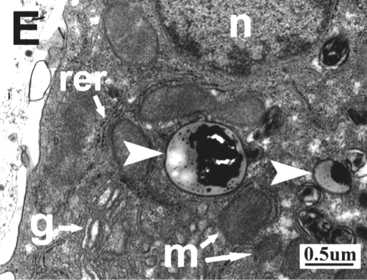 Fig. 3. Microscopía de células ppHEP y PICM-19FF marcadas con 0,86 μm de MPIO a 100 MPIO/célula después de 24 h. Micrografías electrónicas de transmisión de células PICM-19FF cargadas con MPIO (panel E). g = aparato de Golgi, n = núcleo, m = mitocondria, rer = retículo endoplásmico rugoso